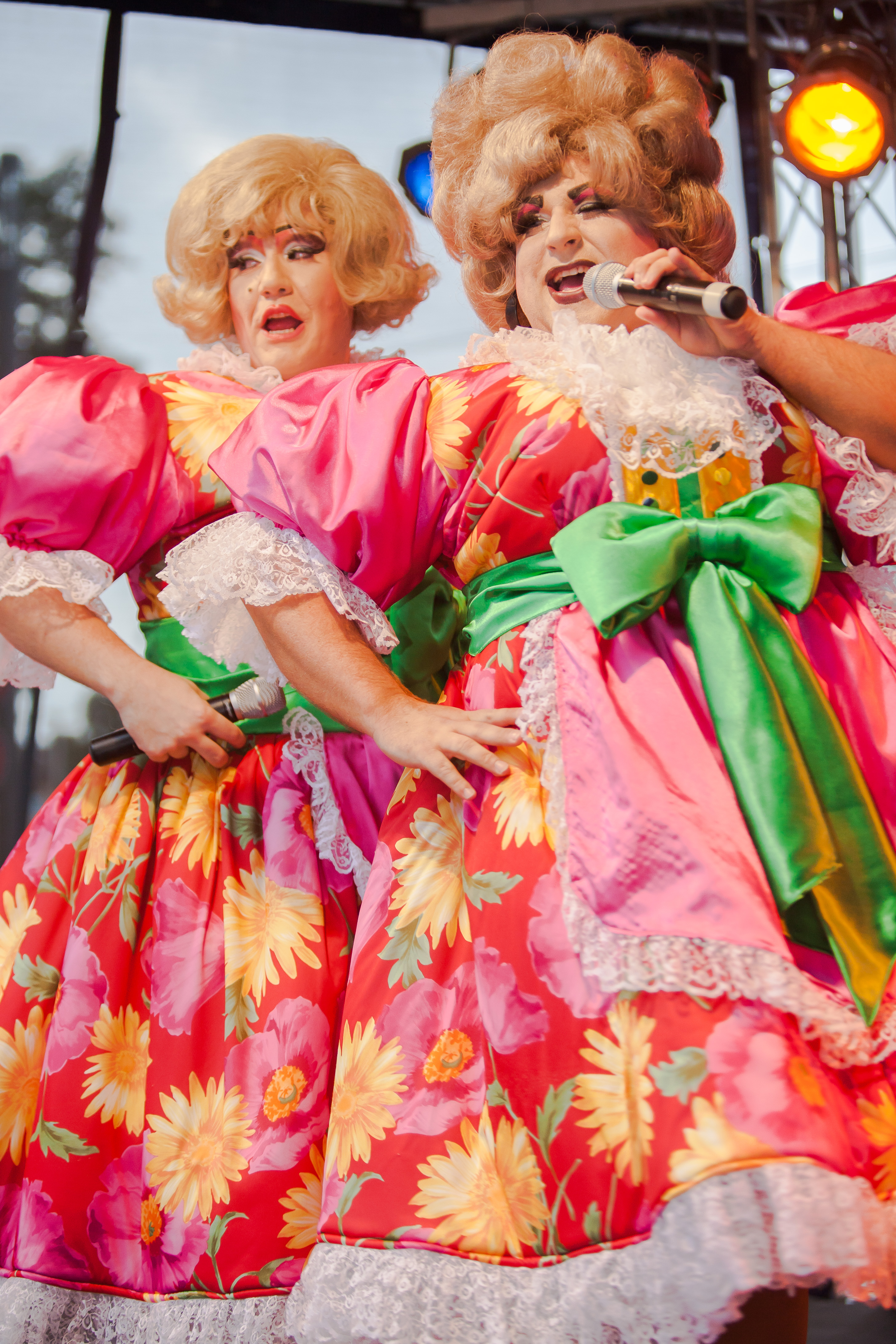 Das Travestie-Duo „Ham & Egg“